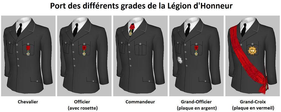 Infographie des différents grades et dignités de l'ordre national de la Légion d'honneur.